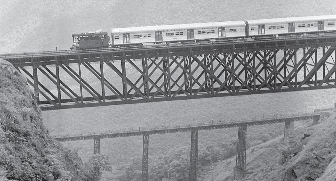 Um trem Série 101 sem os carros motores sendo conduzido por um locobreque pela ferrovia Santos-Jundiaí, no trecho da Serra do Mar (Serra Nova).